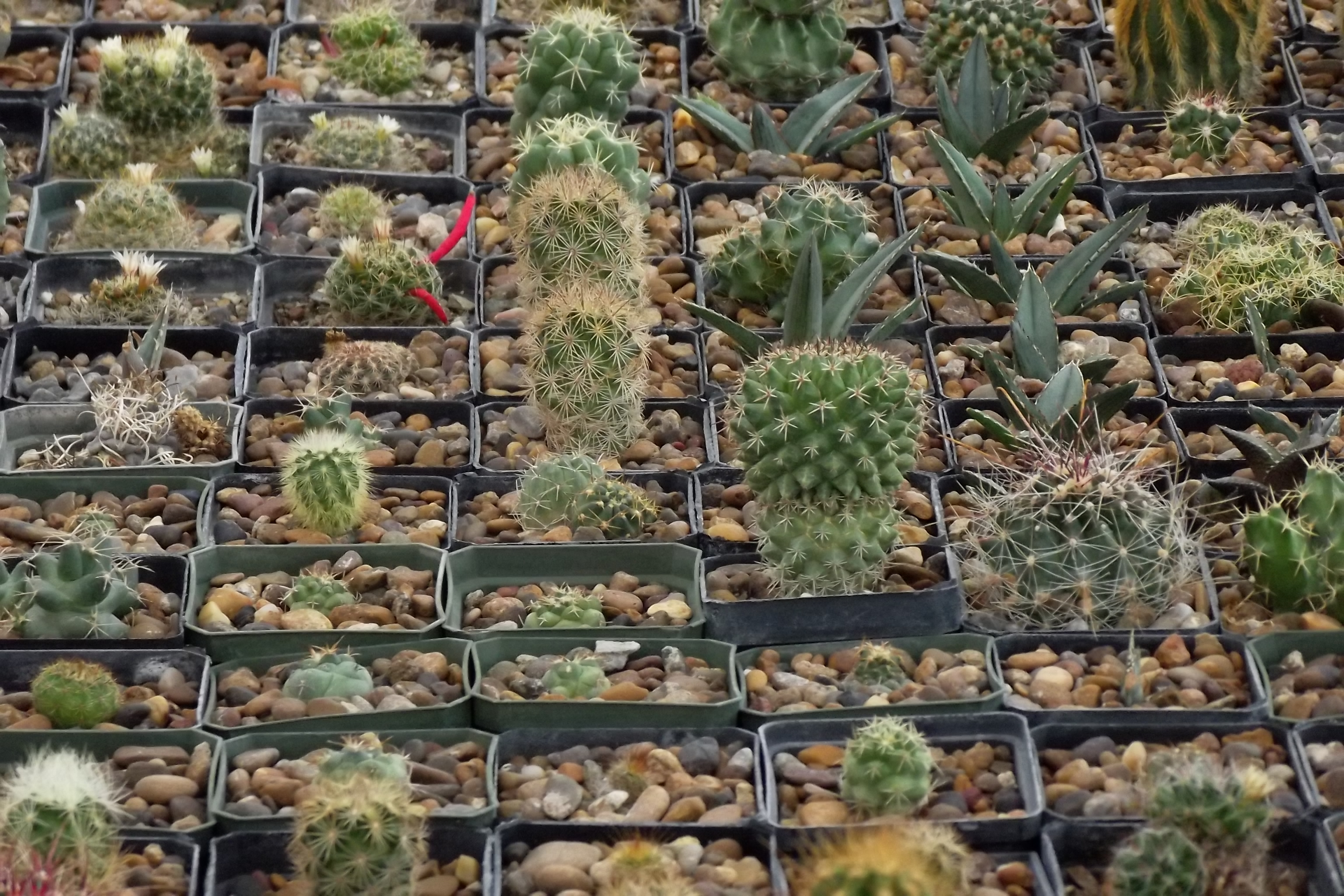 Museo de Desierto, Saltillo Coahuila México